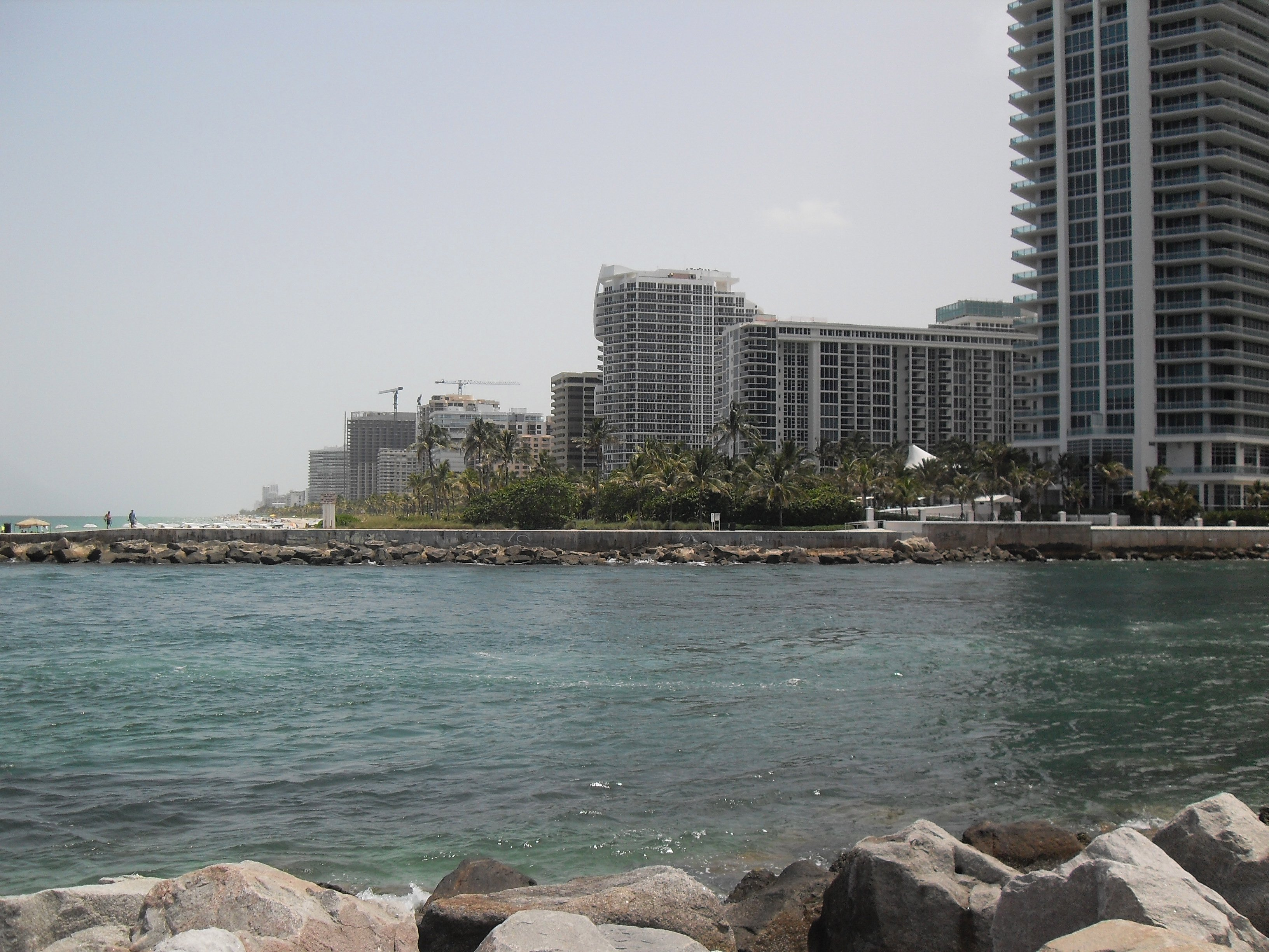 Baker's Haulover Inlet am südlichen Ende von Haulover park in Miami Beach